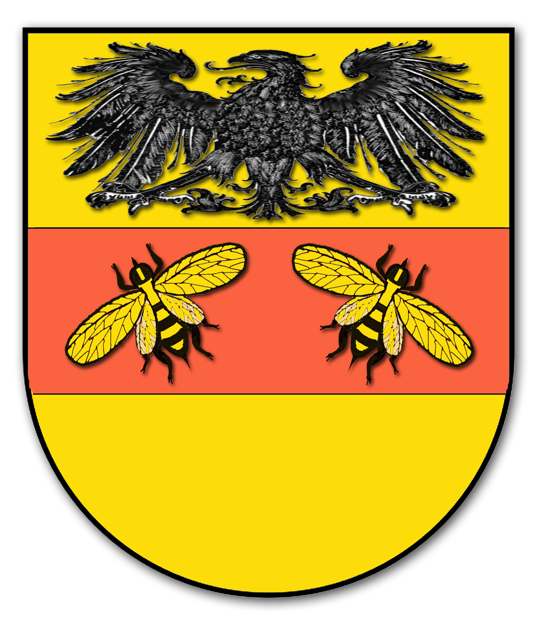 Brasão Pecchio - Pectis - Pezziis - Pegiis - Petii de Milão, com ramos na Toscana, Veneza e no Trentino (Sporminore, Cressino, Dercolo)